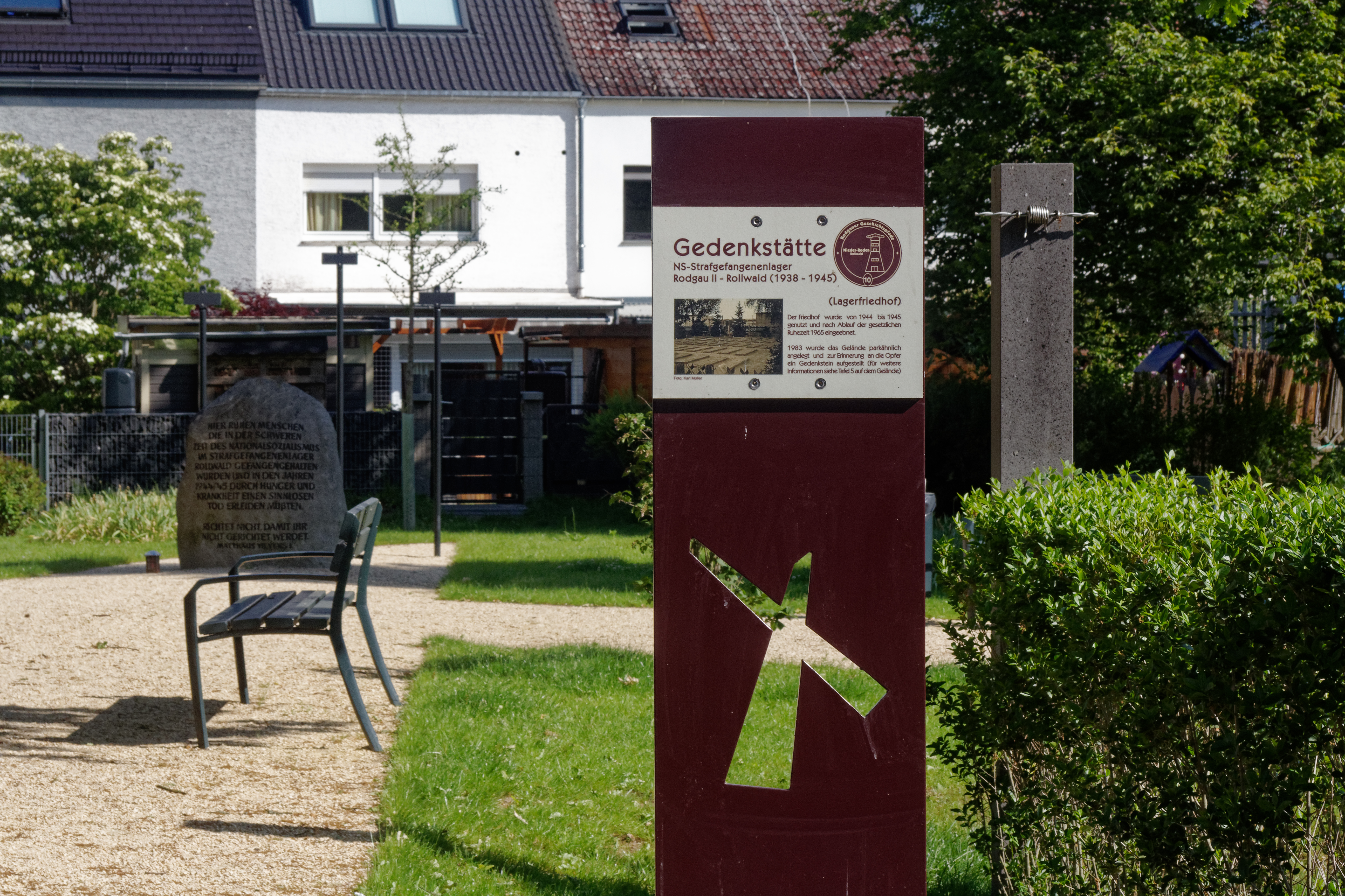 Gedenkstätte auf dem ehemaligen Friedhof des NS-Strafgefangenenlagers Rollwald, 2018 nach einem Entwurf von Dirk Melzer umgestaltet.